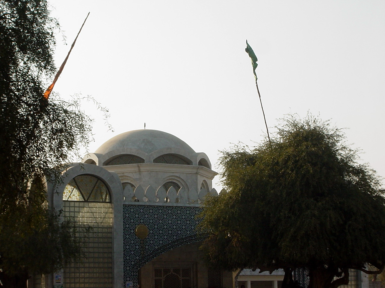 دربار بابا بلھے شاہ